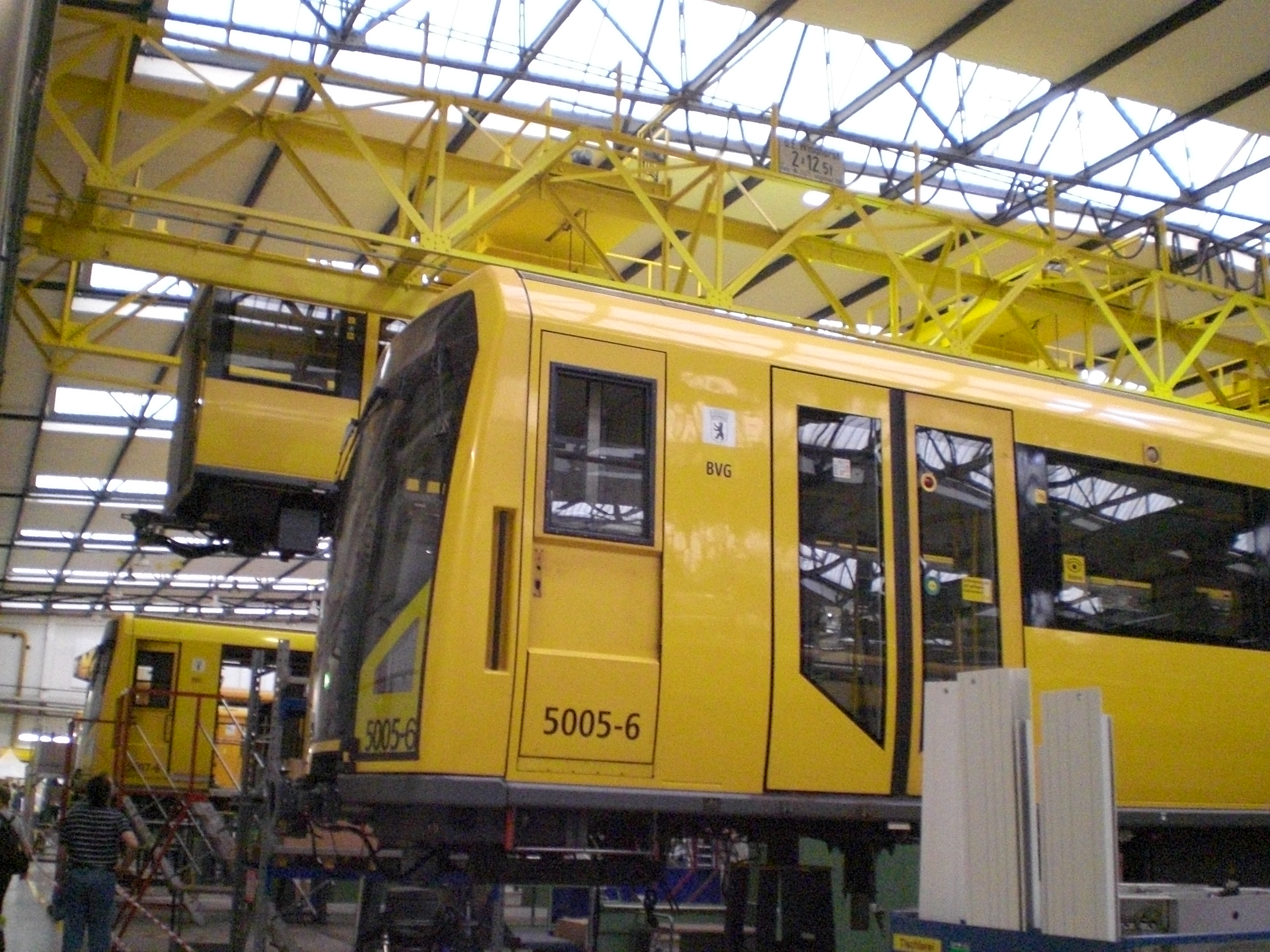 U-Bahn Hauptwerkstatt Müllerstraße